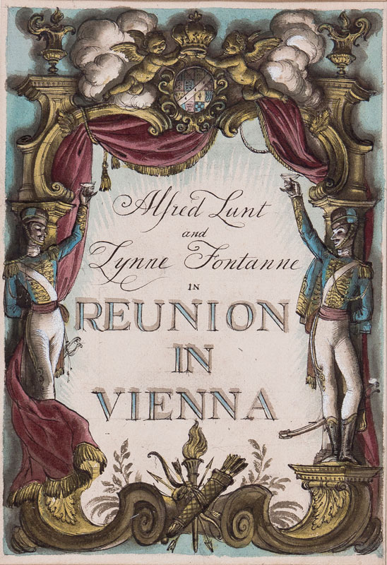 Reunion in Vienna - Programme